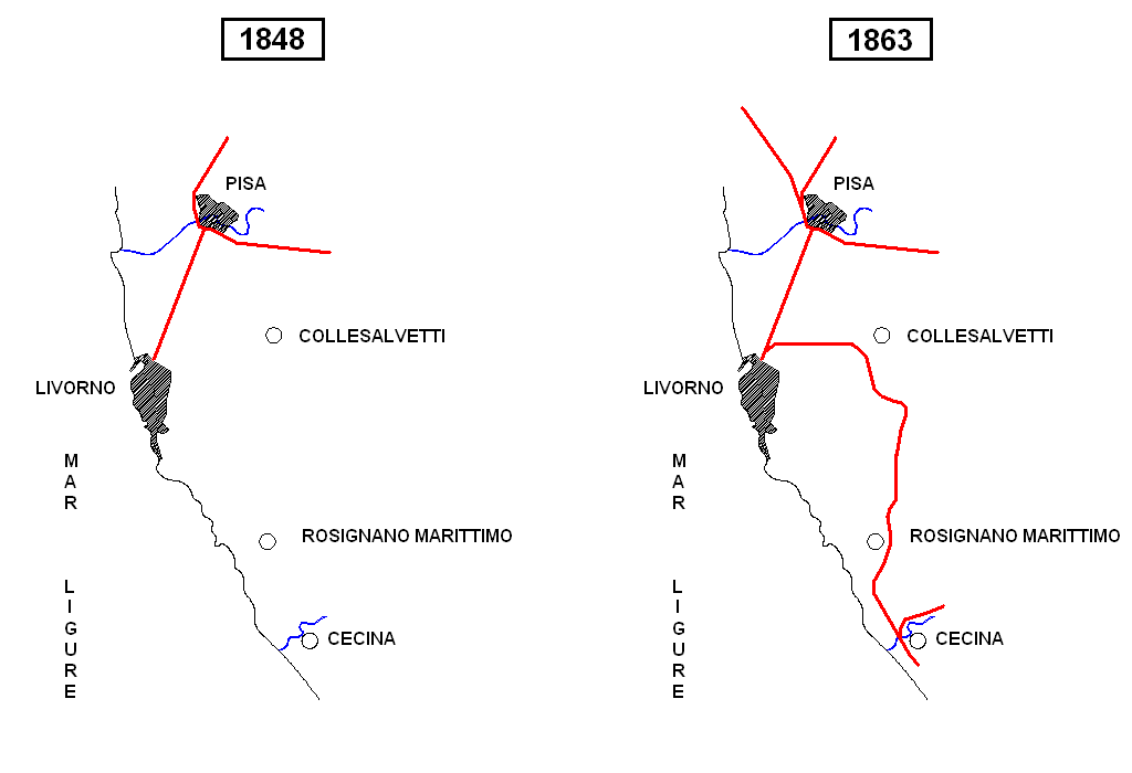 Livorno: evoluzione della linea ferroviaria dal 1848 al 1863.